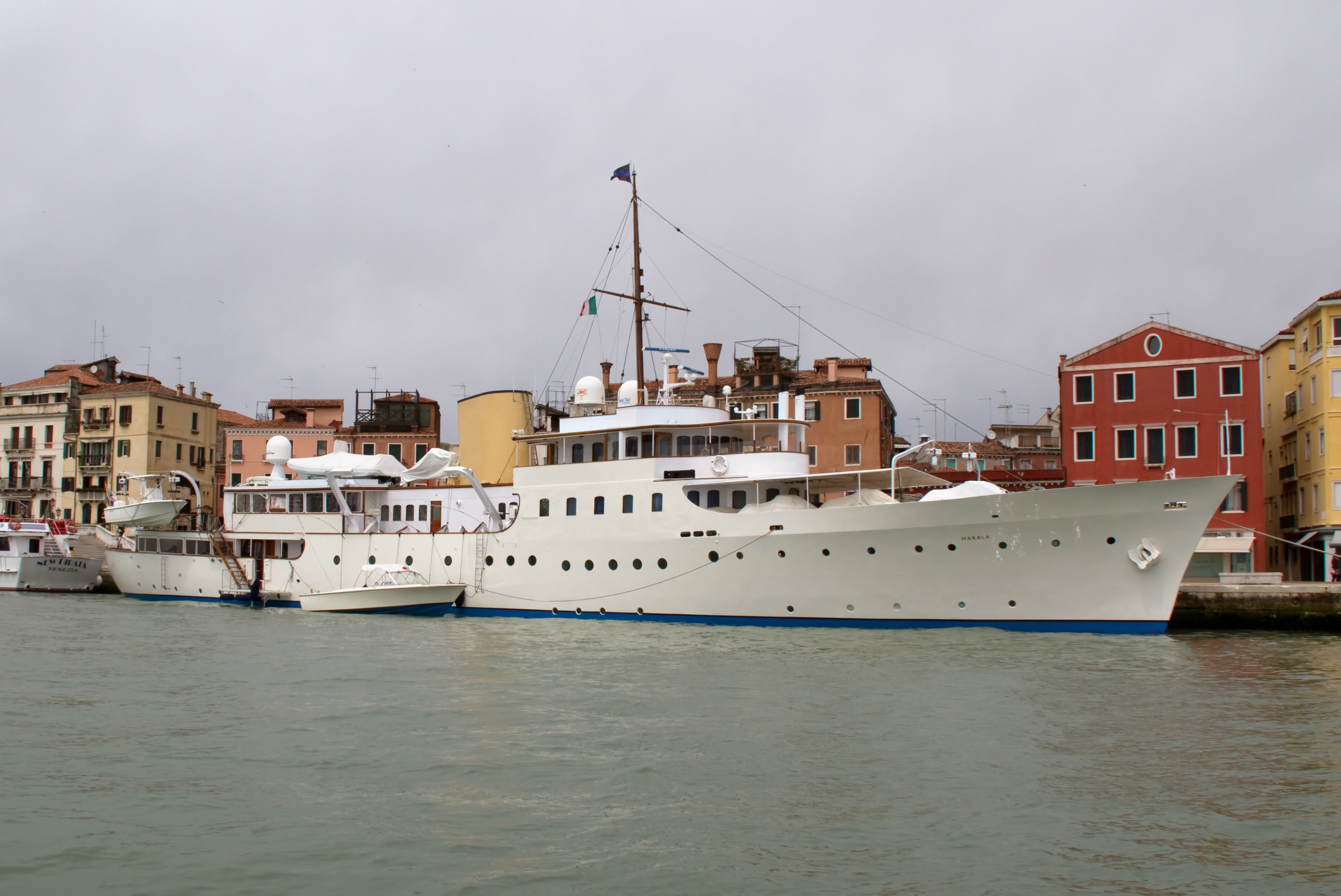 Marala